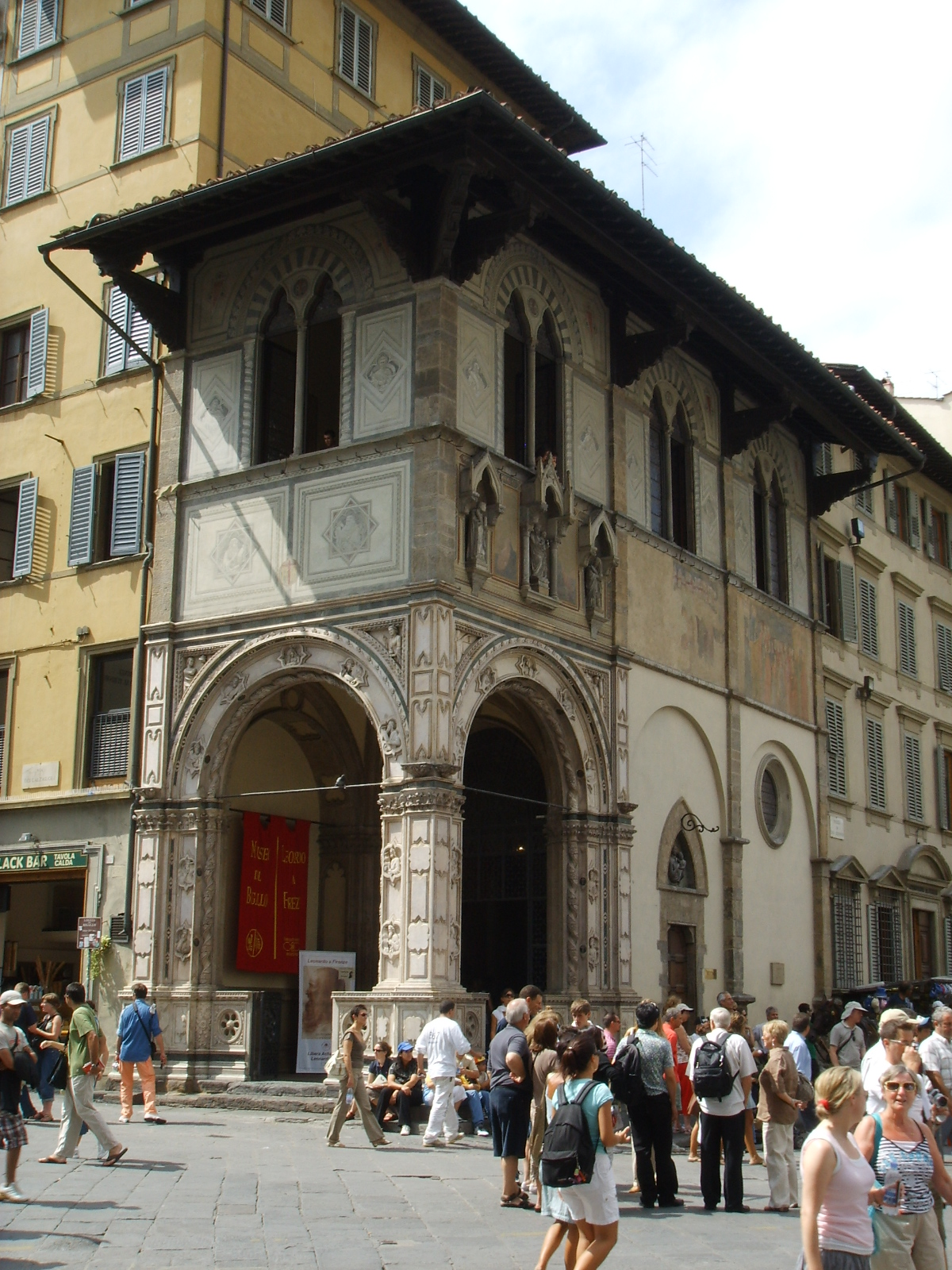 Loggia del Bigallo a Firenze. 1870s. 2007.